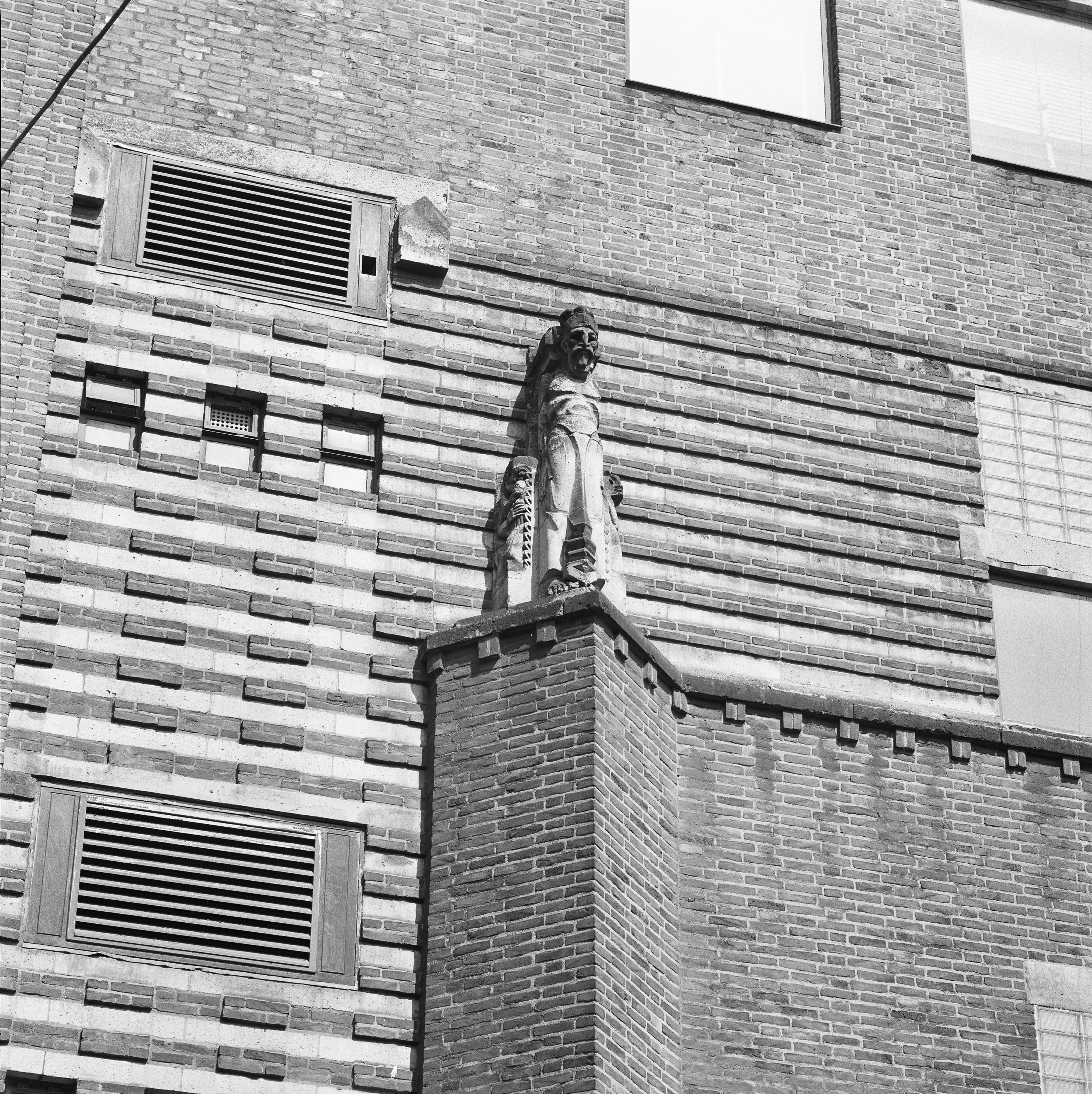 V.M. LABORATORIUM VRIJE UNIVERSITEIT: Exterieur BEELDHOUWWERK BOVEN INGANGPARTIJ